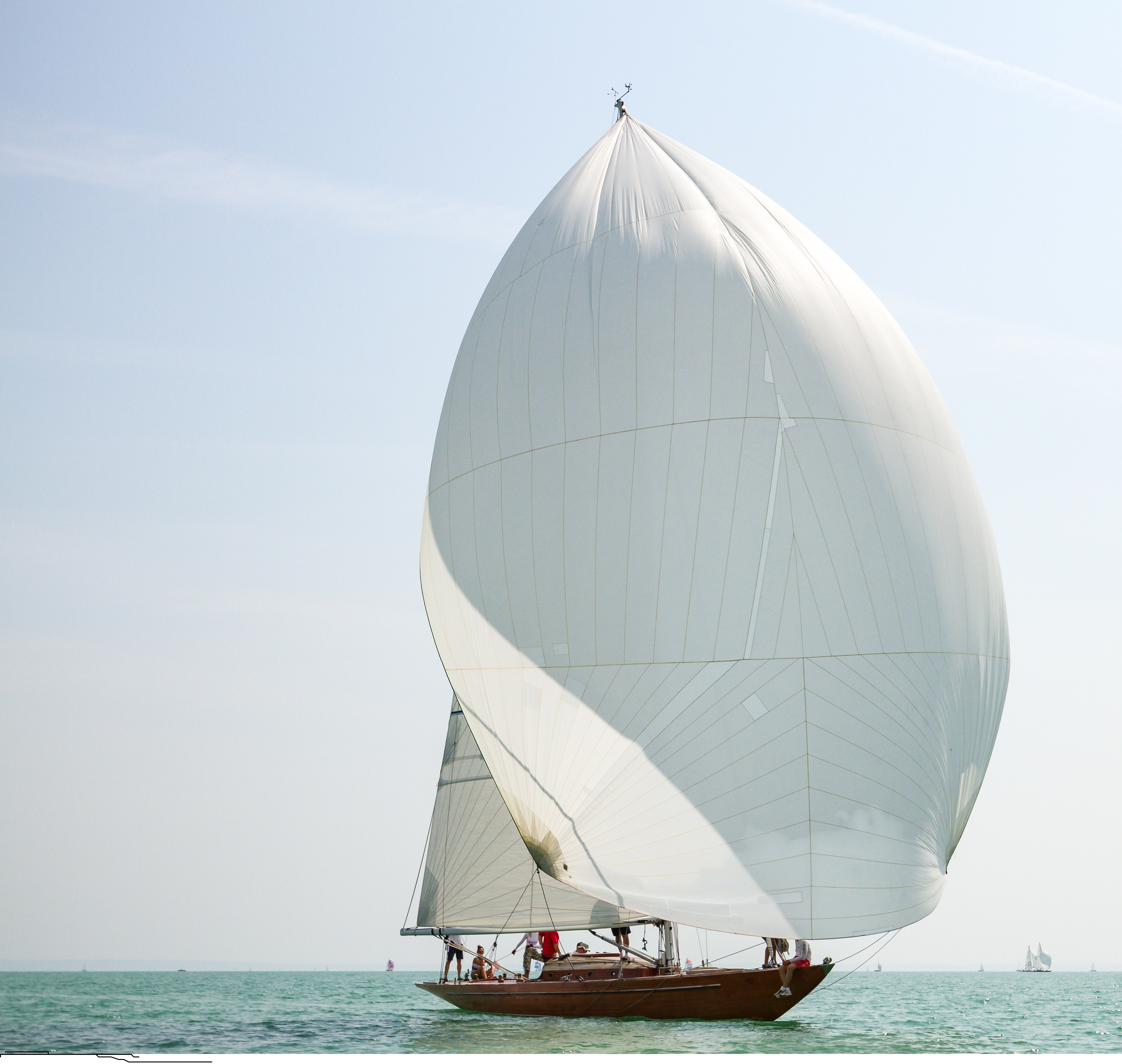 Nemere II. a Balatonon